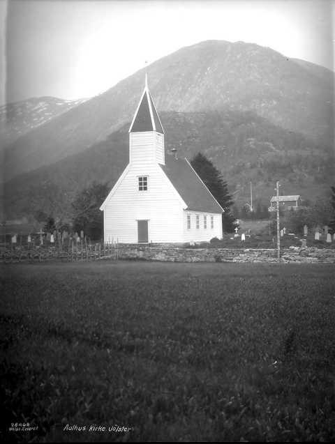 Ålhus kyrkje